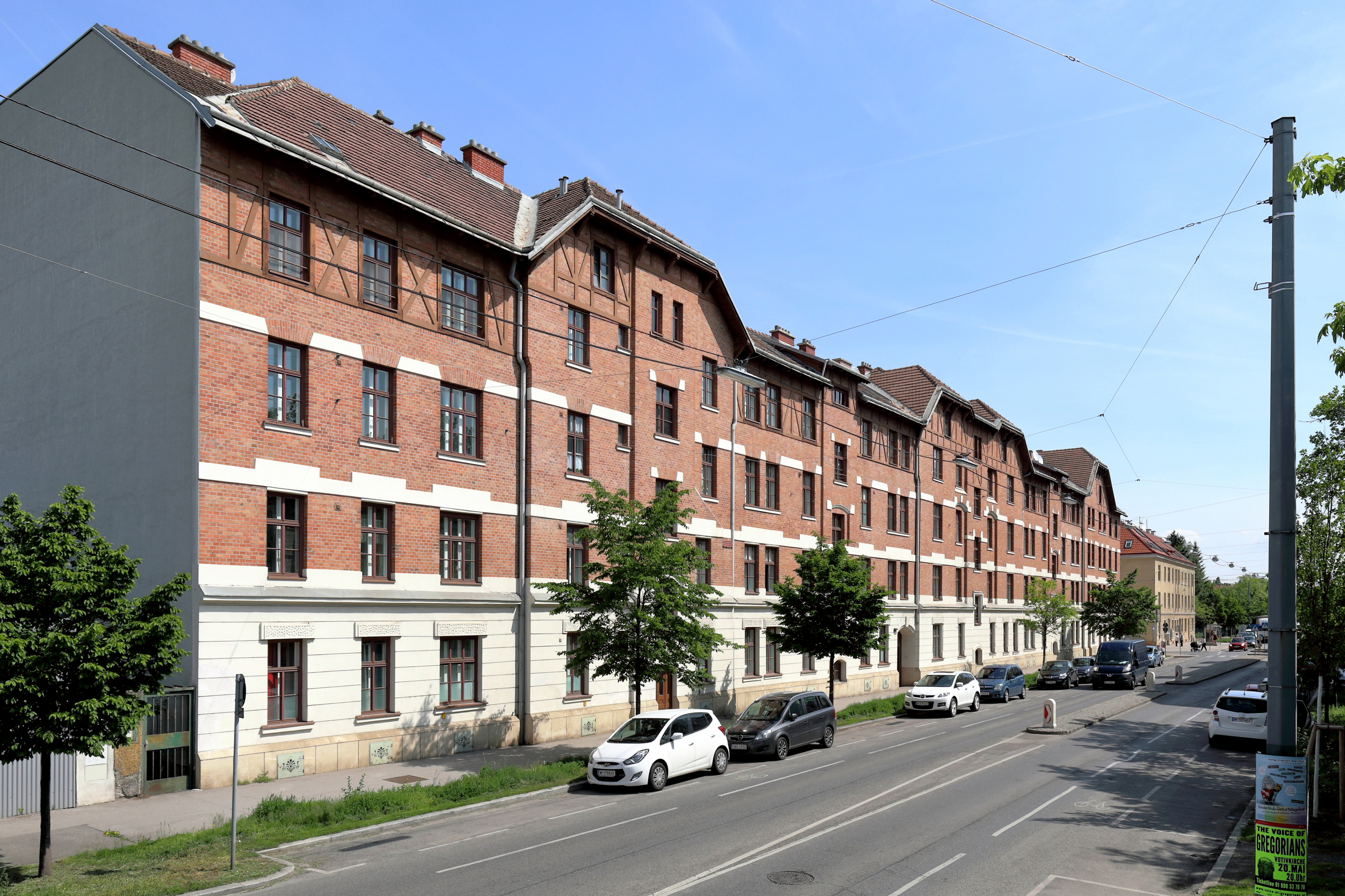 Die Wohnhausanlage an der Adresse Leopoldauer Straße 79-81 im 21. Wiener Bezirk Floridsdorf.Die Wohnhausanlage in der Form eines Vierkanthofes und mit einem begrünten Innenhof hat rund 123 Wohnungen. Sie wurde für die Arbeiter der Unfallversicherungsanstalt für Niederösterreich von 1900 bis 1907 nach Plänen der Architekten Theodor Bach und Leopold Simony errichtet. Die Anlage stand in den 1970er-Jahren wegen des schlechten Zustandes kurz vor dem Abbruch, wurde jedoch von der Stadt Wien erworben und von 1993 bis 1997 um über 4 Mio. Euro saniert. This media shows the Vienna residential building (Gemeindebau) with the ID 1452.